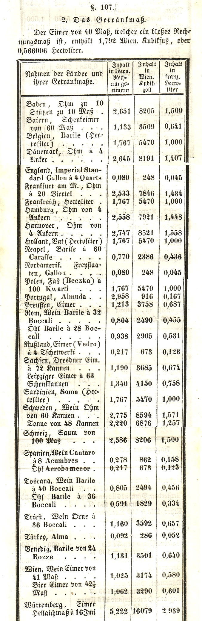 Alte Maßeinheiten / Getränkemaße